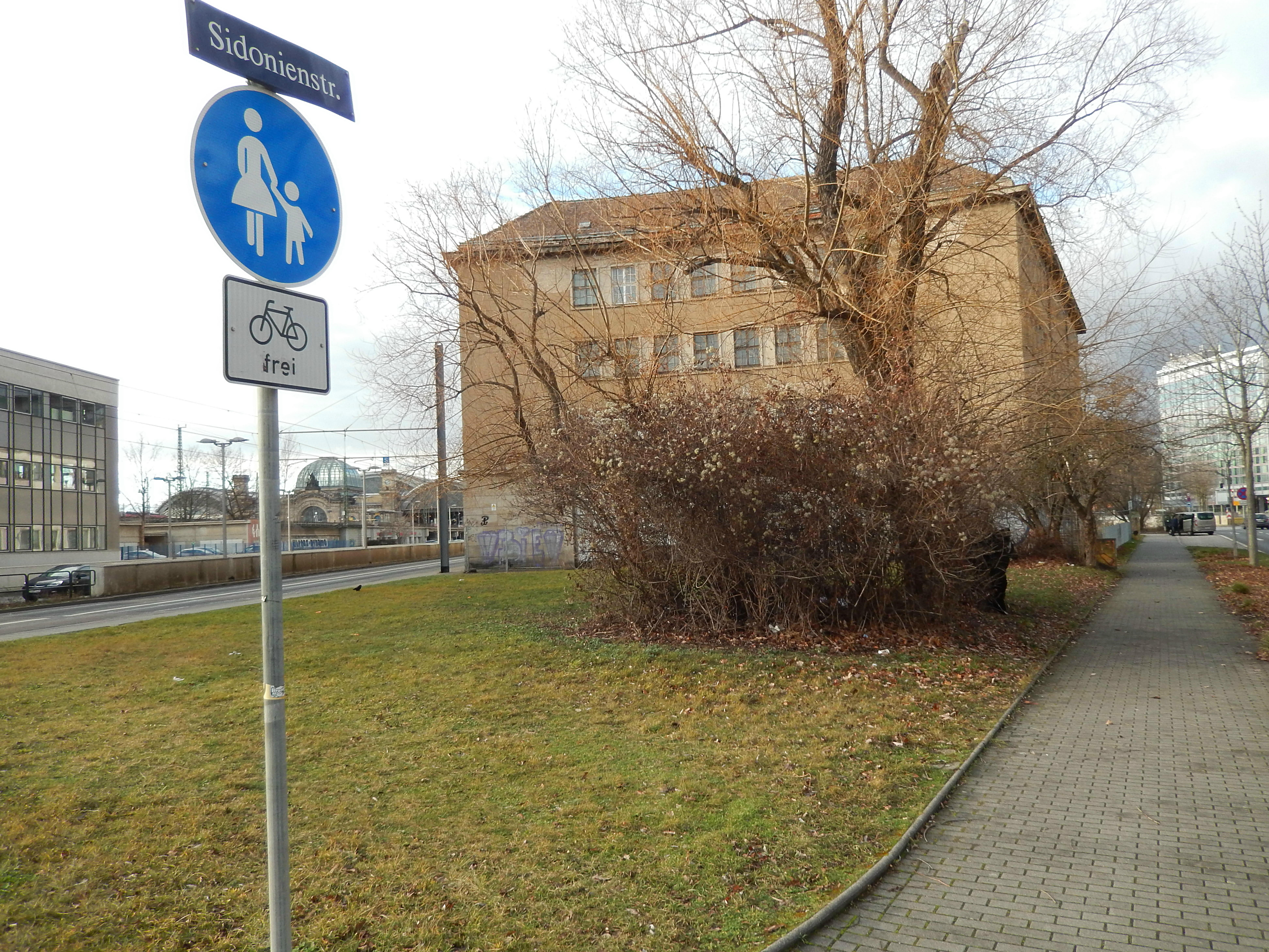 Dresden-Seevorstadt: Siemenshaus Sidonienstraße 18. Im Hintergrund der Erweiterungsbau Reichsbahndirektion Dresden